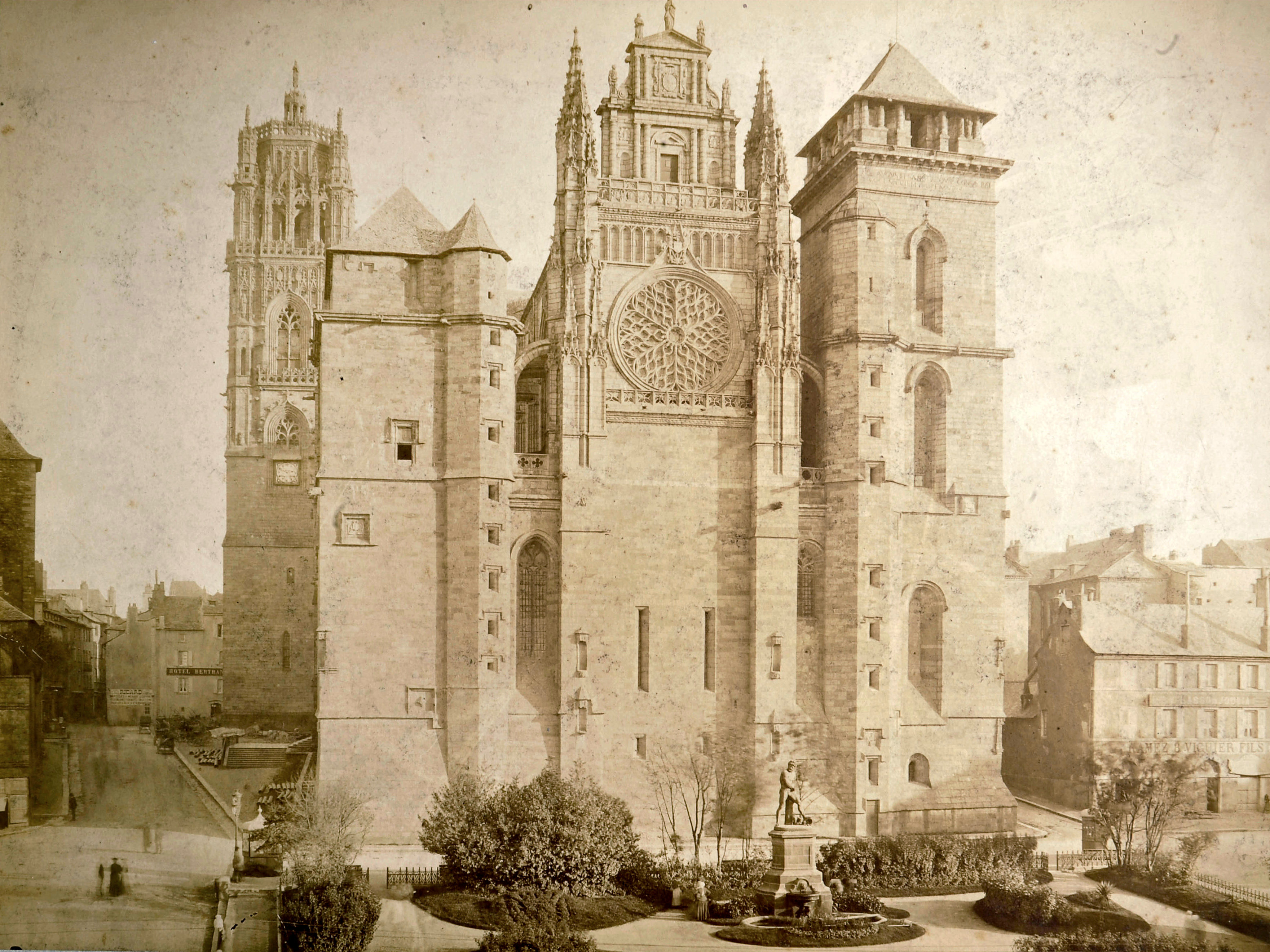 Rodez. – Cathédrale Notre-Dame, [façade ouest] / Médéric Mieusement. – [1885]. – 1 photogr. Sepia ; 27,5 × 37 cm sur un support cartonné 30 × 39,5 cm. 7DRAC33